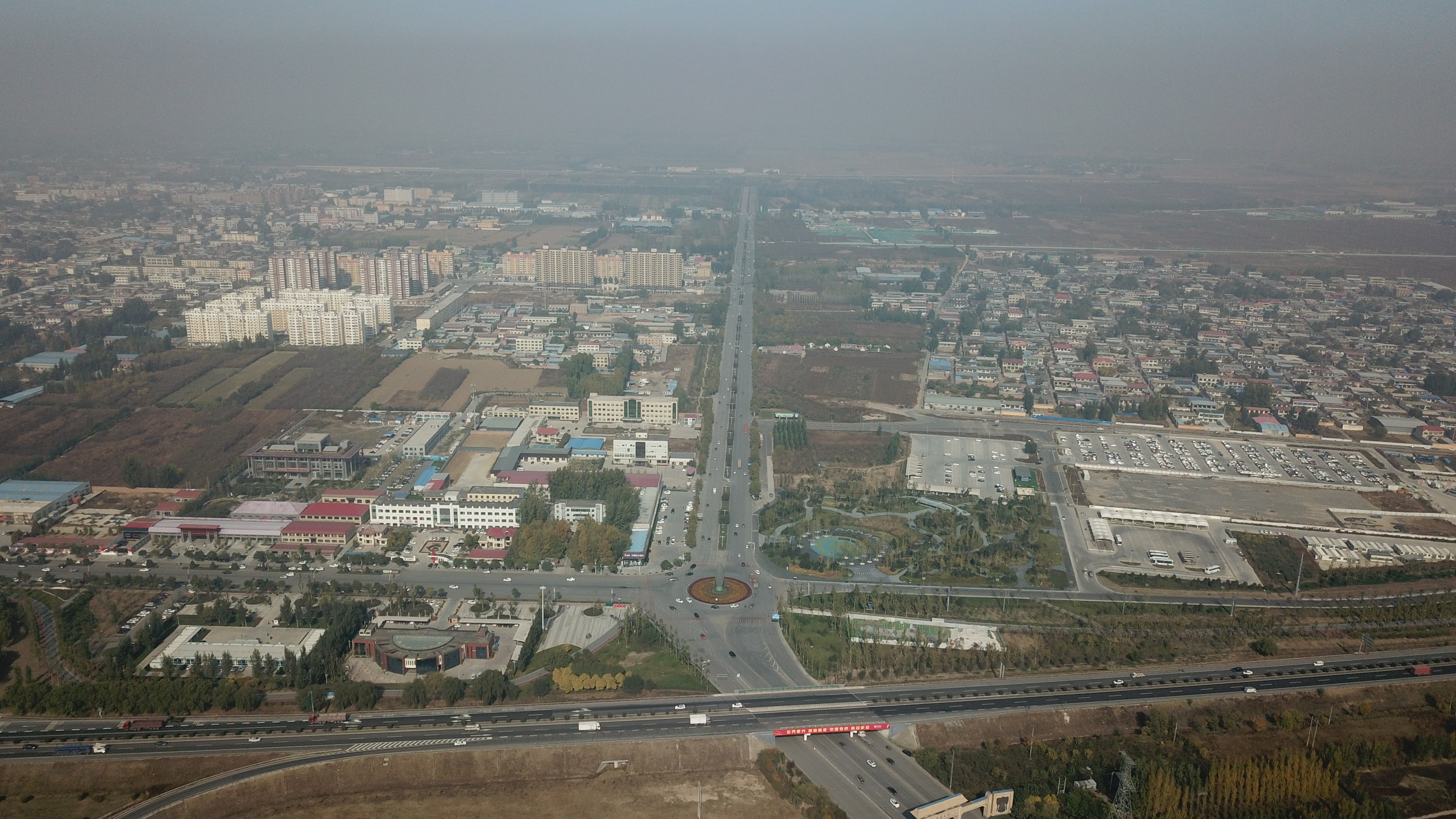 中文（中国大陆）: 河北保定容城县津海大街（南北向）与荣乌高速（底部东西向）交汇处。